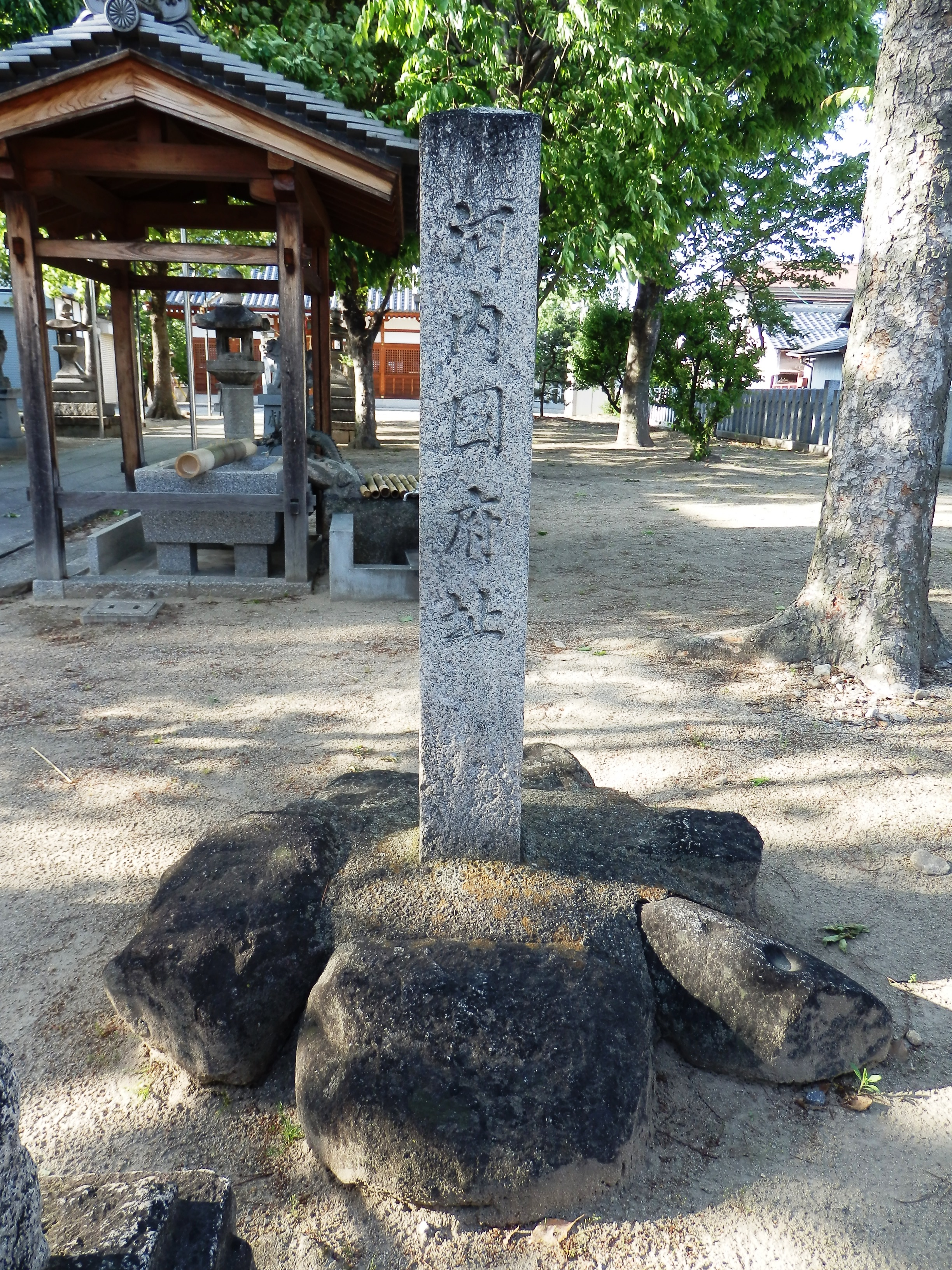 河内国府跡推定地、「此附近河内国府址」碑（大阪府藤井寺市）